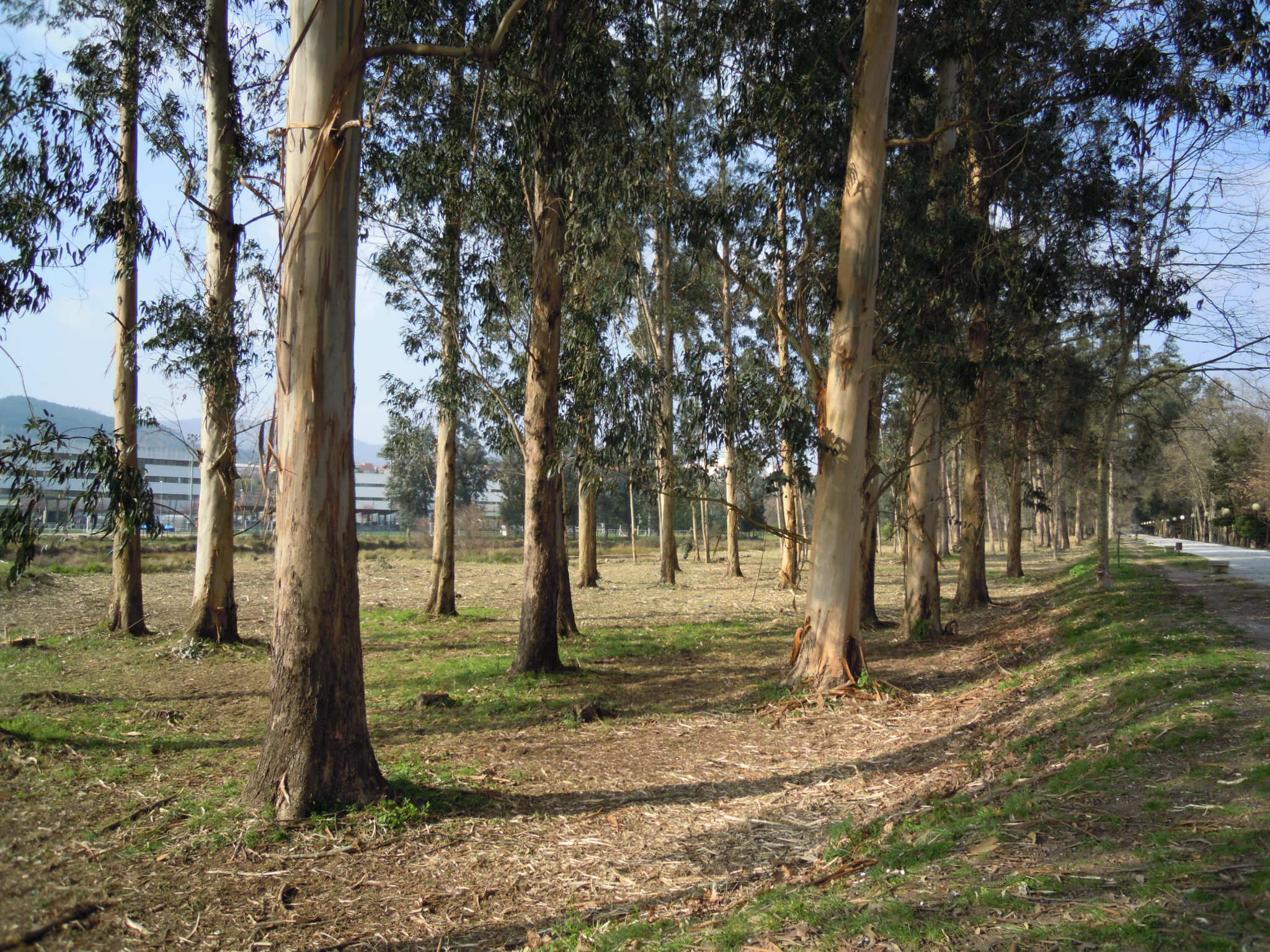 eucaliptal na illa das Esculturas (Pontevedra)